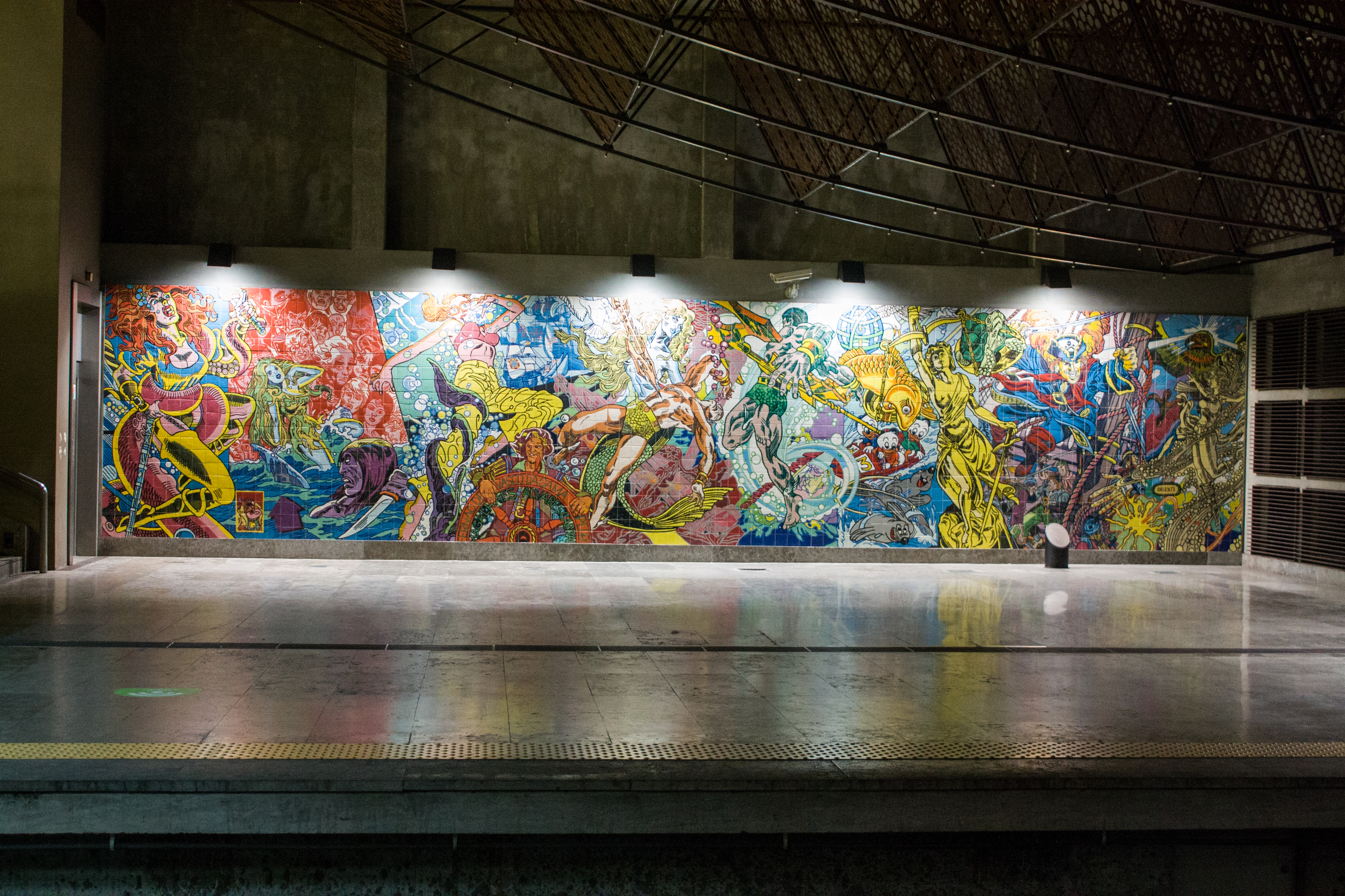 Murales in Oriente Metro Station